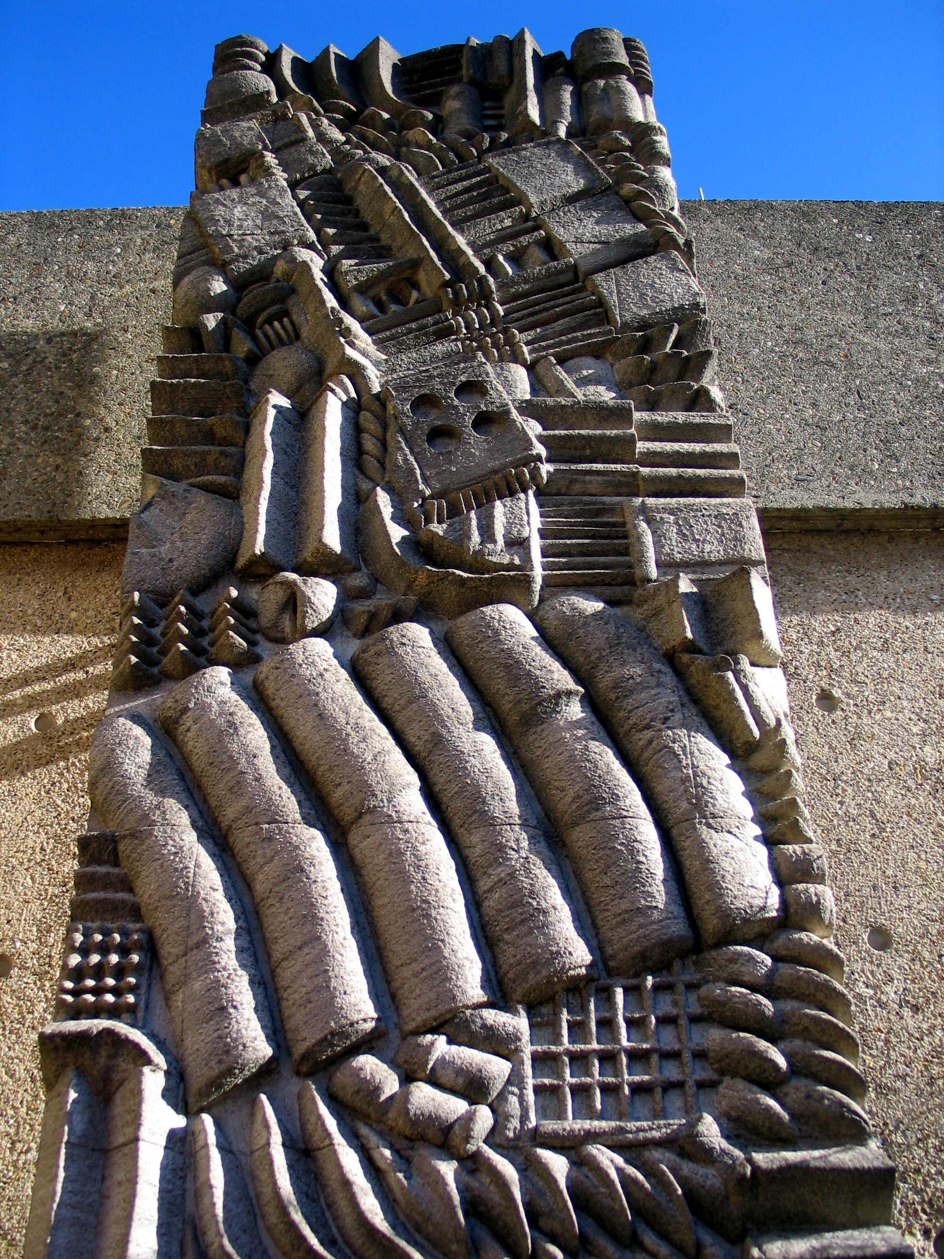 Detail des Monument für Reisende, Monument for Travellers, Monument pour Voyageurs von Werner Schreib ...